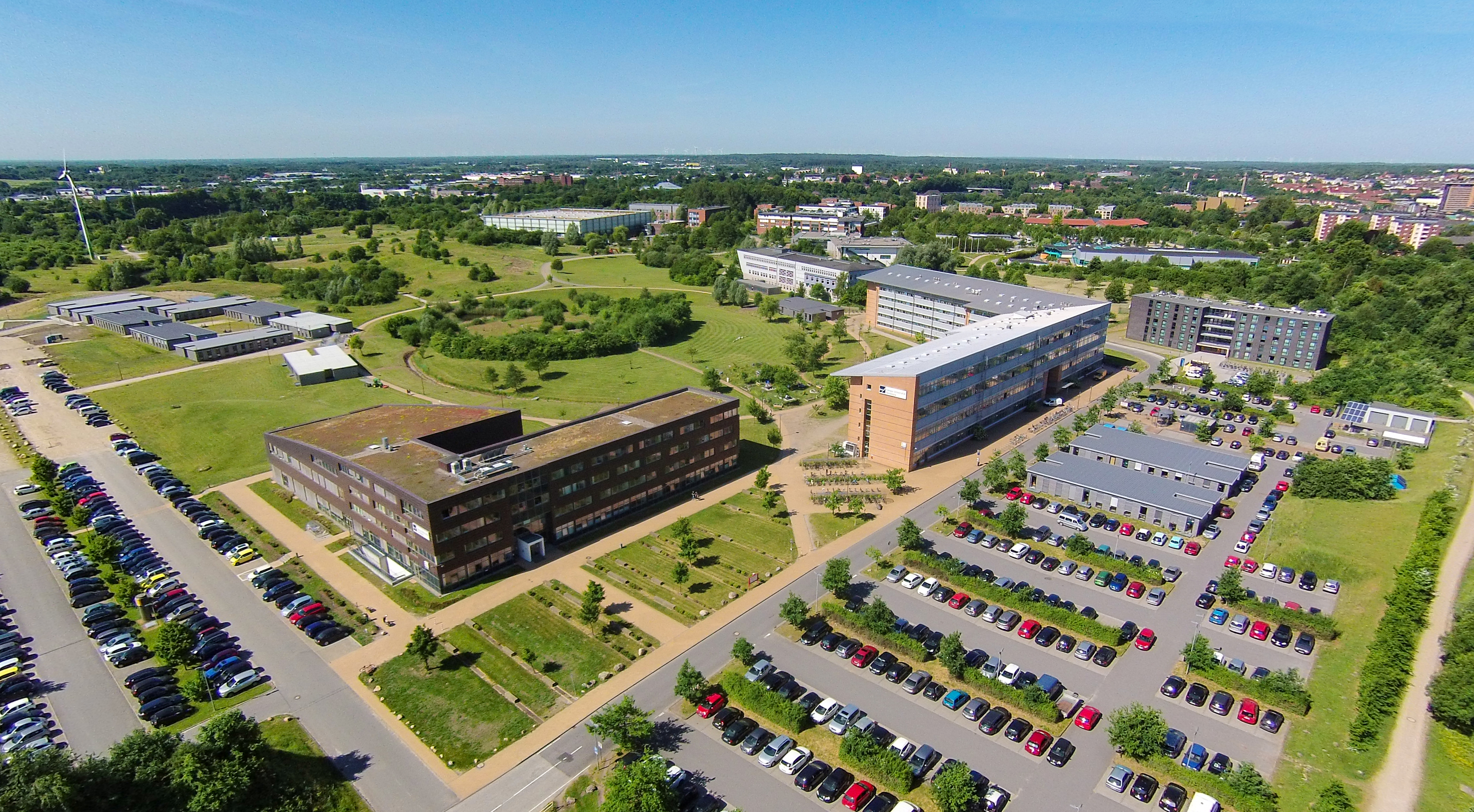 Luftaufnahme des Campus Flensburg mit den Gebäuden Helsinki und Oslo im Vordergrund